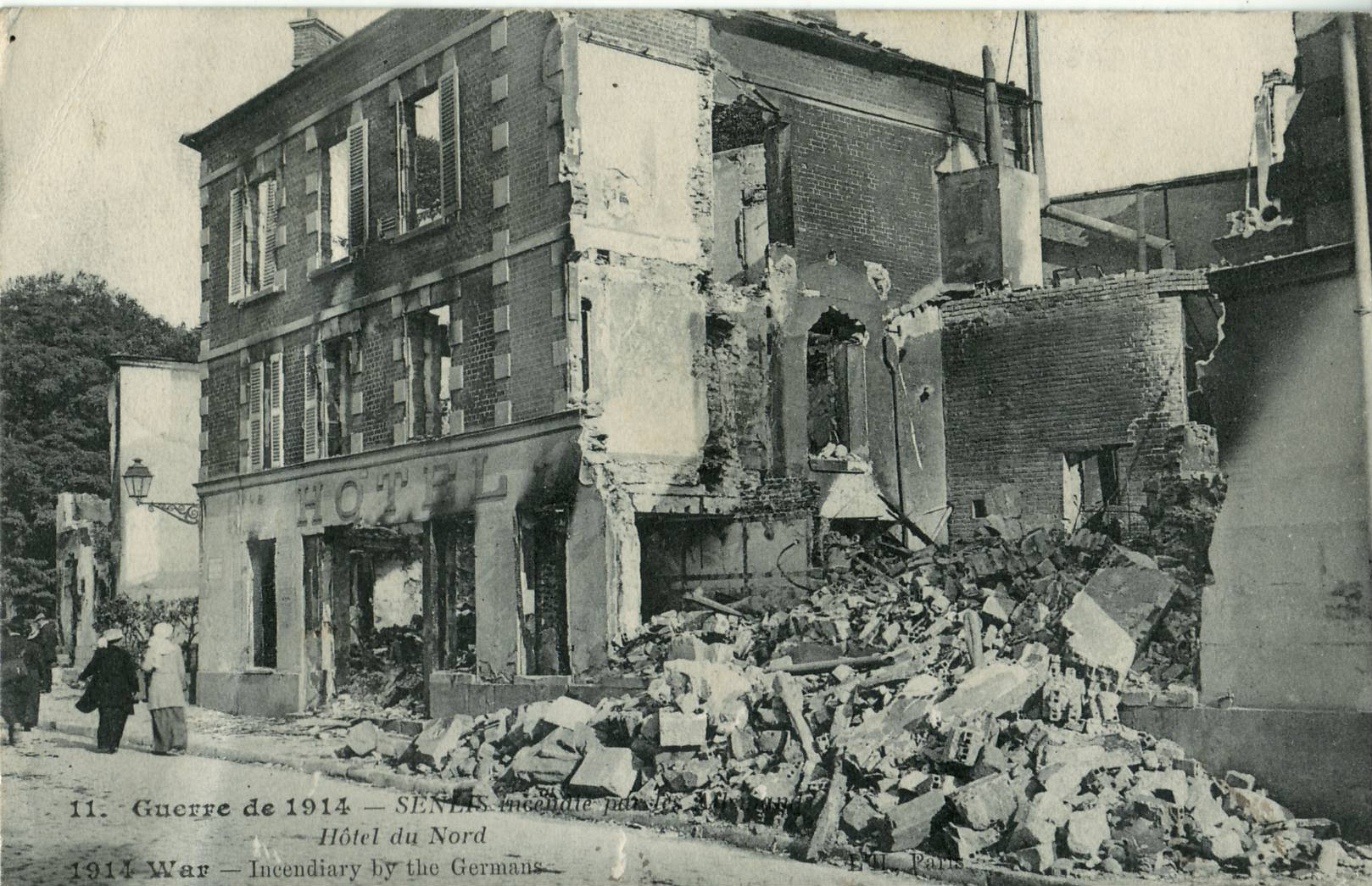 Carte postale ancienne éditée par l'H à Paris, série Guerre de 1914, n°11 : SENLIS incendié par les Allemands - Hôtel du Nord